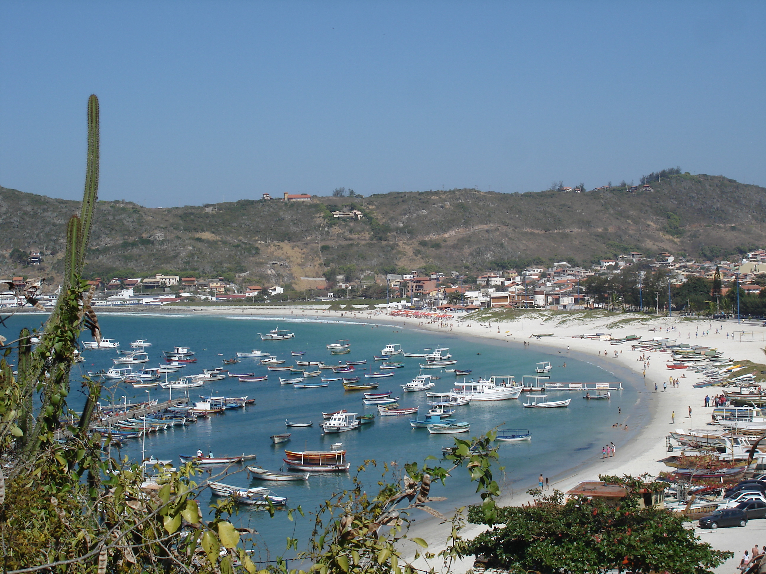 Angel beach, Arraial do Cabo, Rio de Janeiro, Brazil